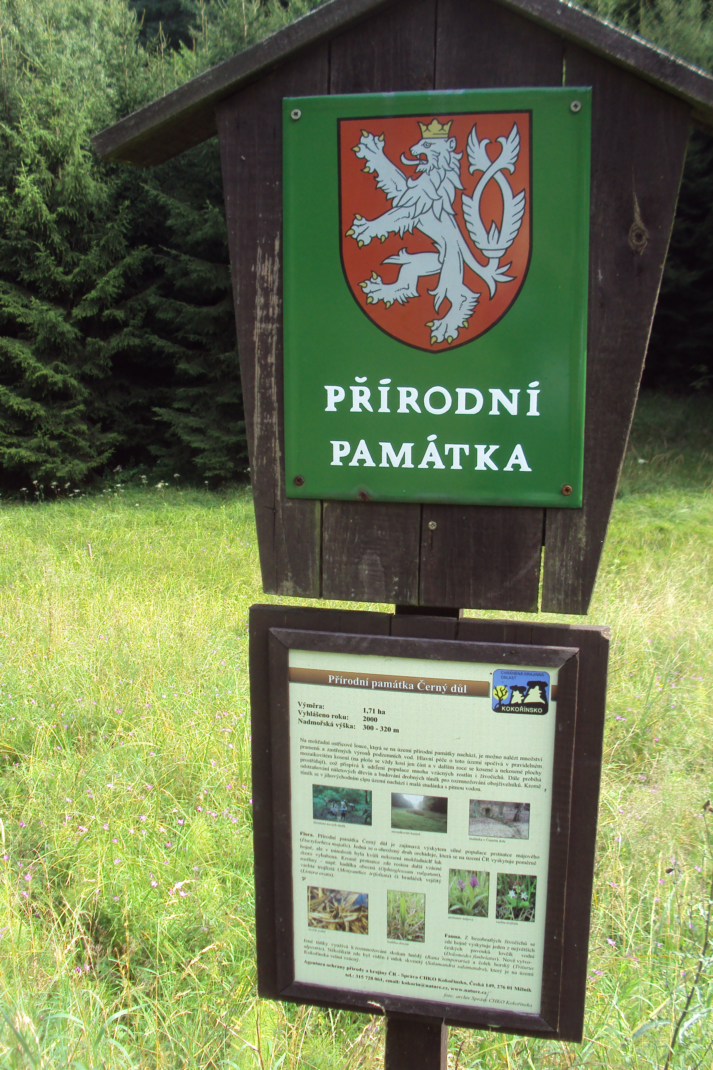 Přírodní památka na Kokořínsku